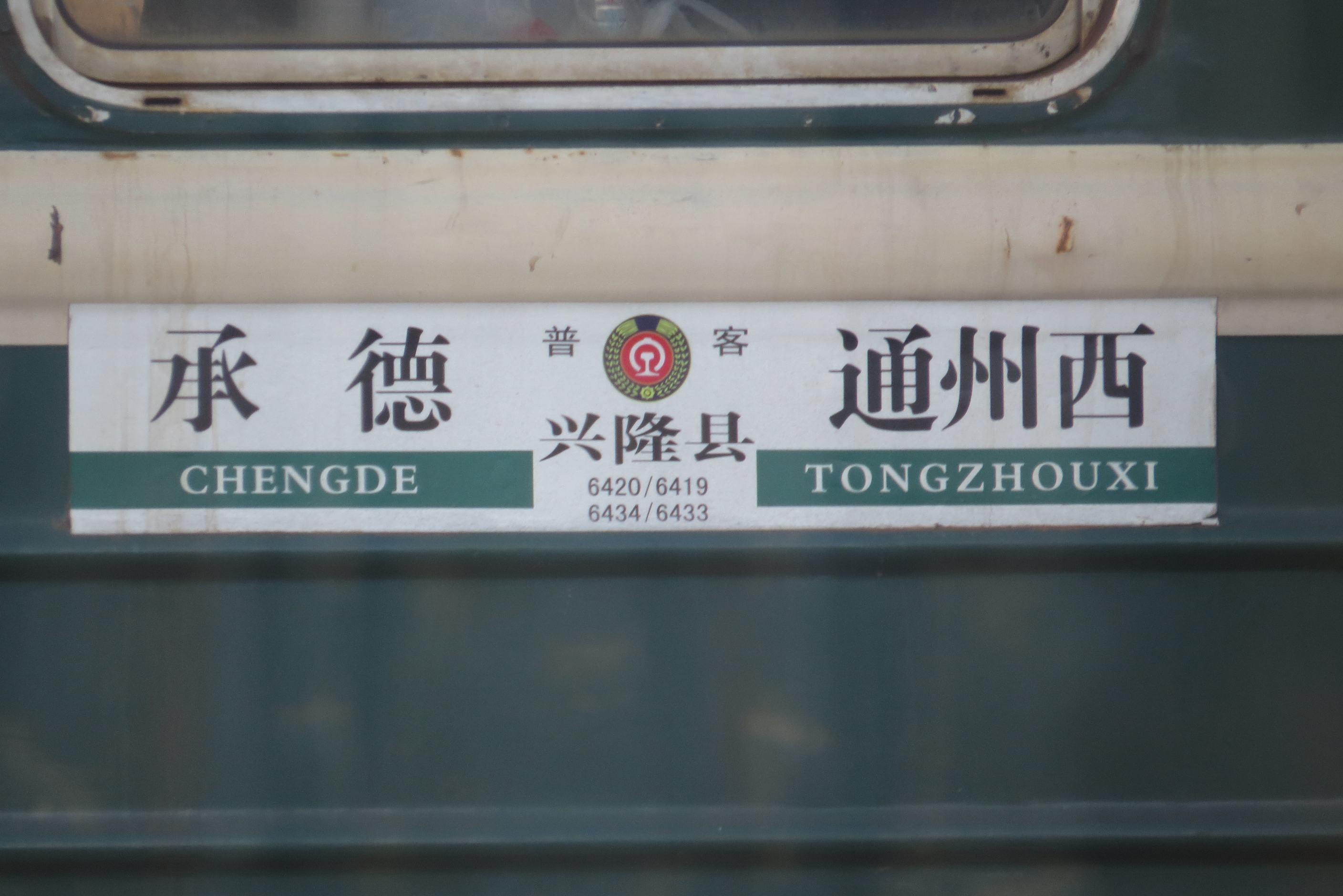 6419/6420次列车水牌（套跑6433/6434次列车）；该列车原车次为7155/7156次